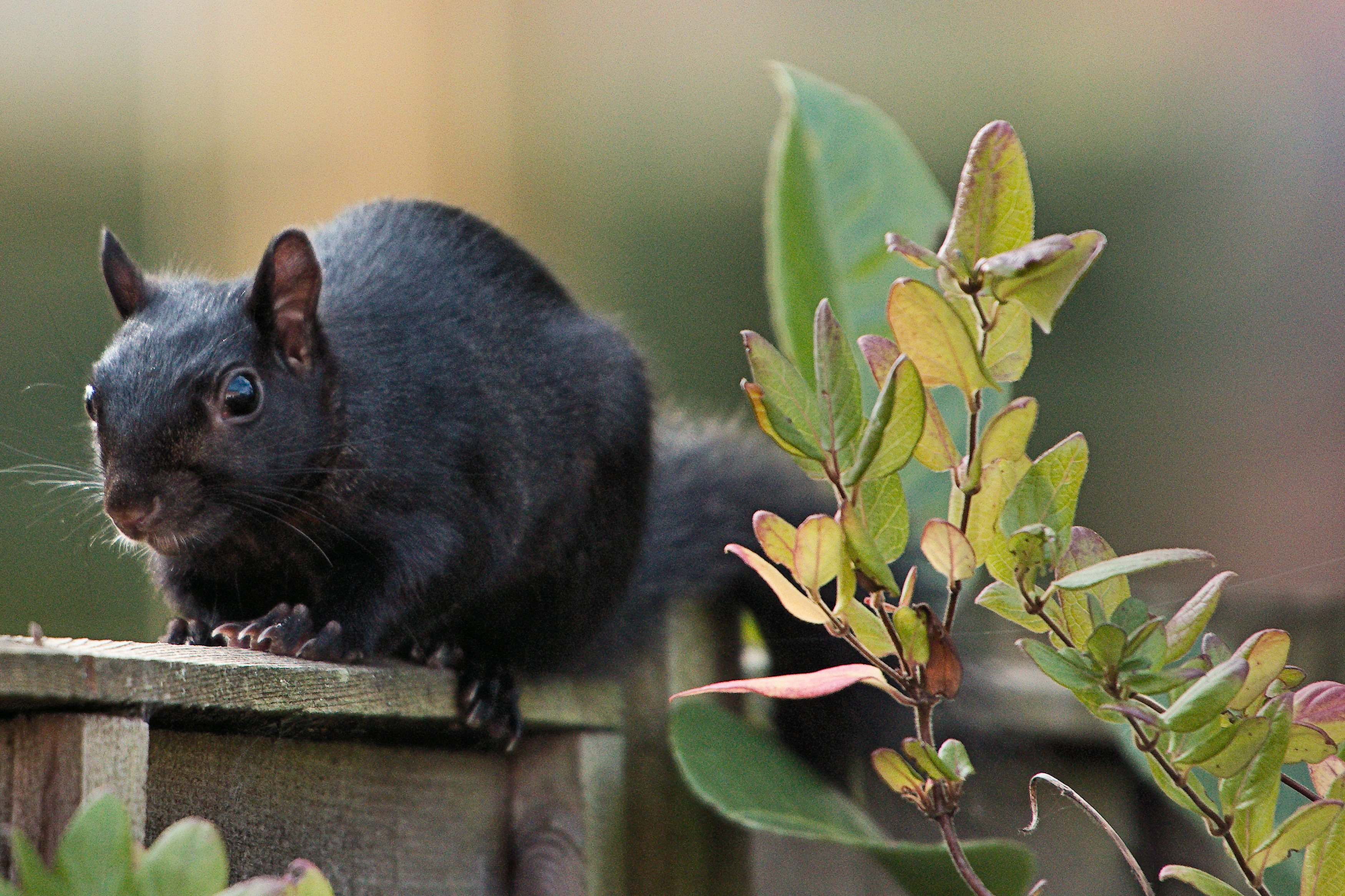 Black Squirrel